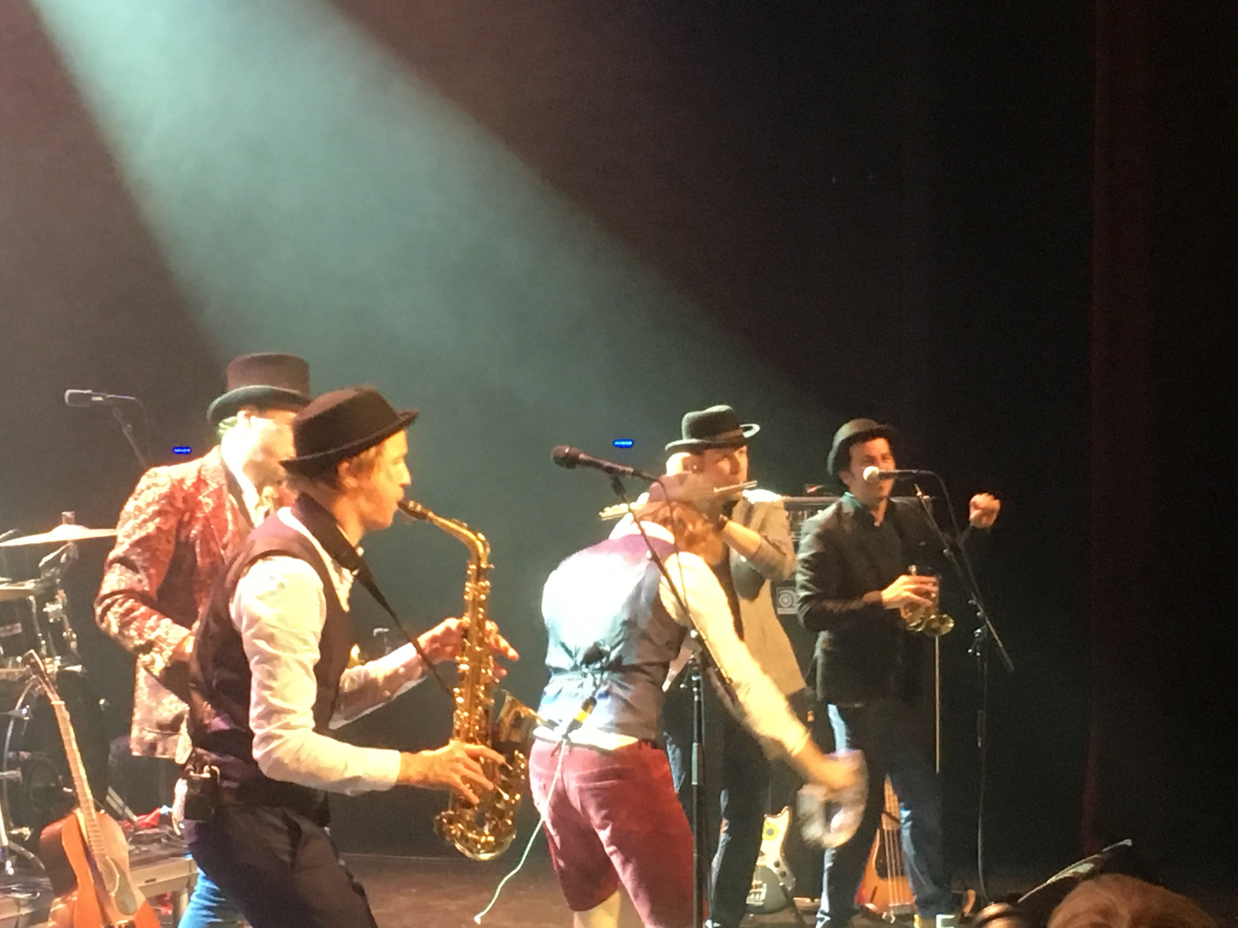 Konsert med Violet Road i Arendal kultur og rådhus 27.10.16